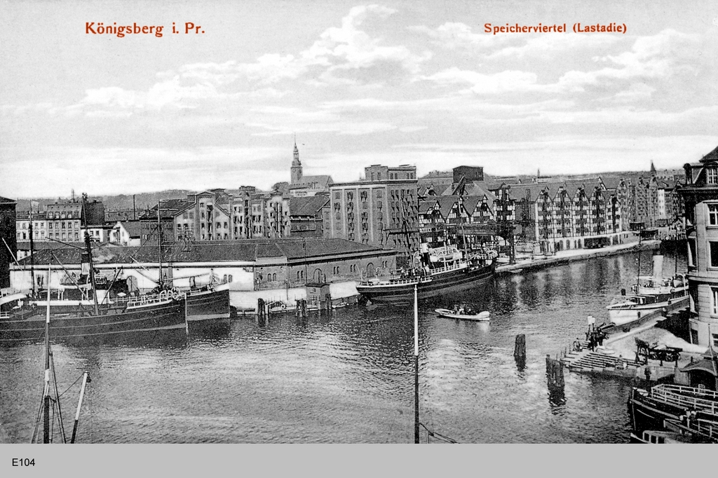 Königsberg